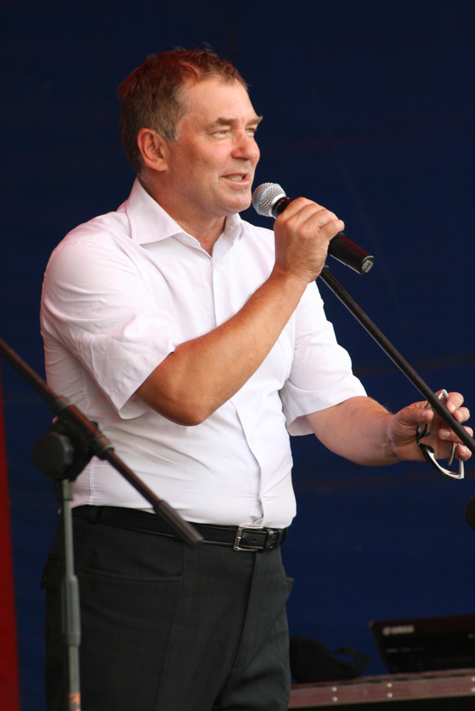 Leszek Malinowski